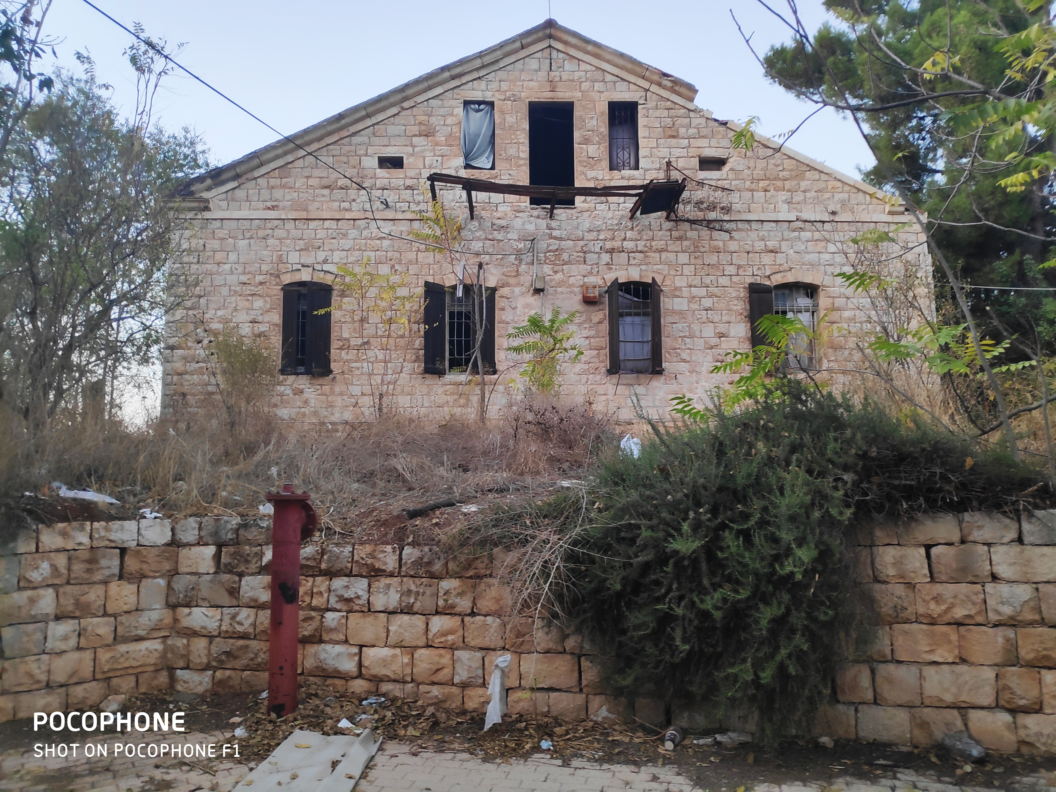 מוזיאון גליצנשטיין הנטוש בצפת, 2019